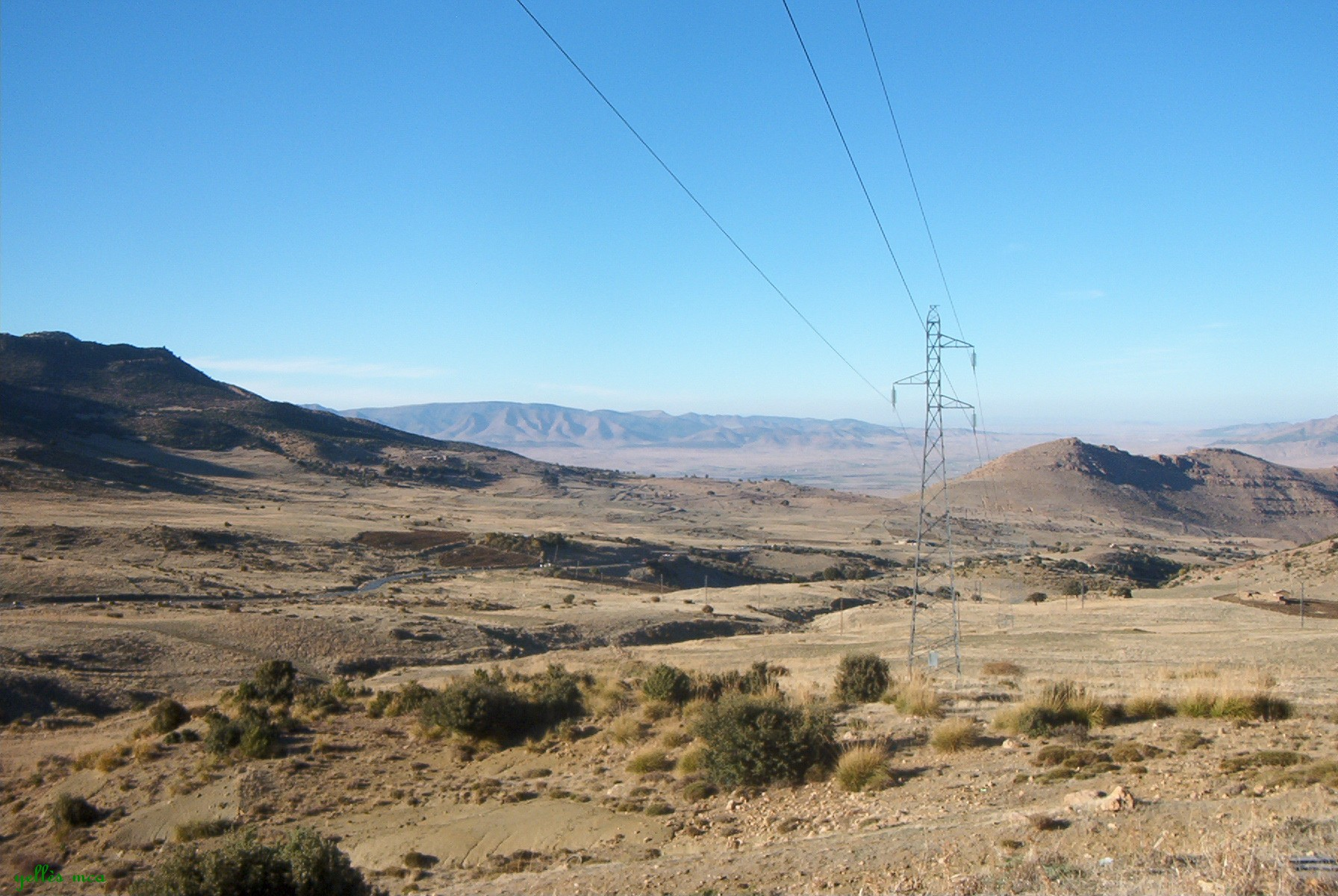 Monts et plaine du belezma dans les environs de Merouana dans les Aurès